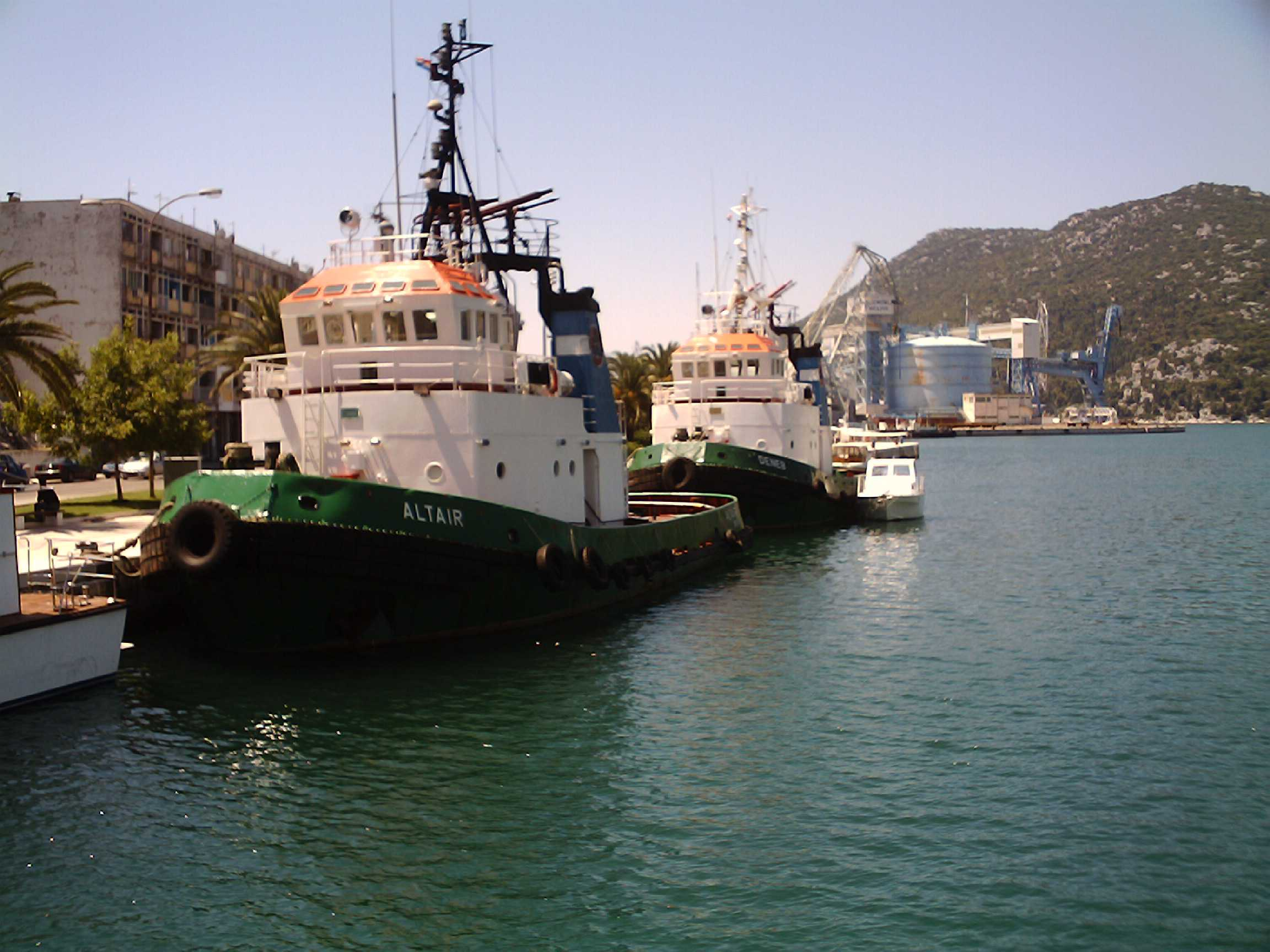 Hafen Ploce, Altair, Ex Trudbenik